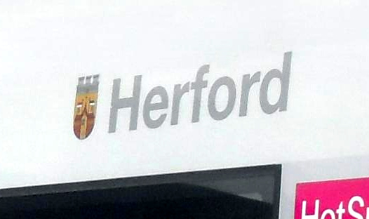 Namensbezeichnung „Herford“ des ICE 403 051-6 (Tz 351). Der ICE steht im Mannheimer Hauptbahnhof.